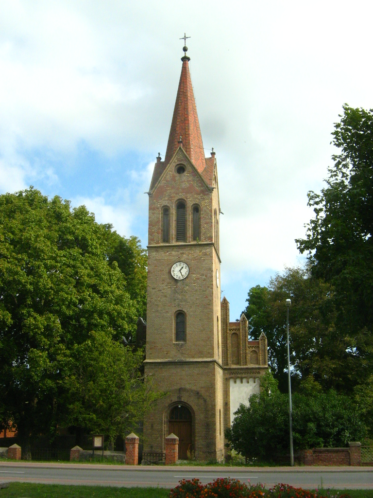 Die Dorfkirche in Belling an der Bundesstraße 109 (Gemeinde Jatznick, Landkreis Uecker-Randow, Vorpommern).